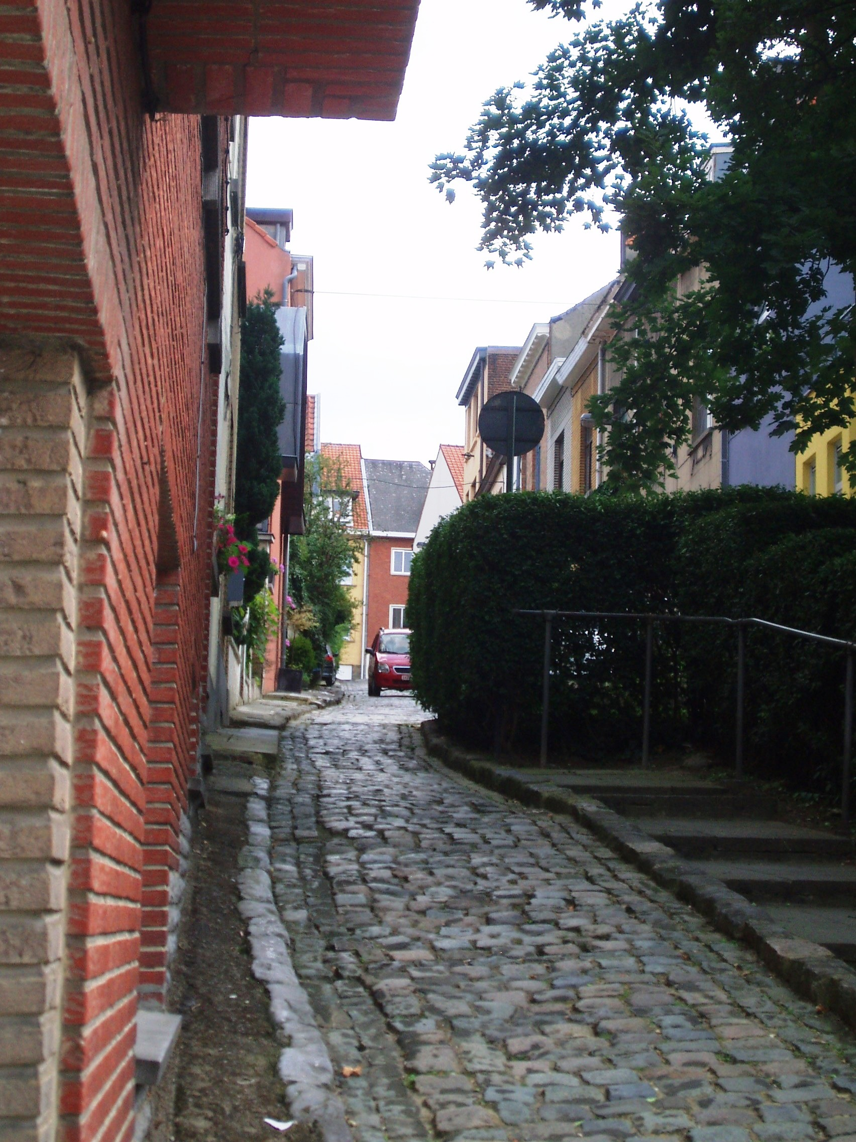 rue du Verger Auderghem Belgium